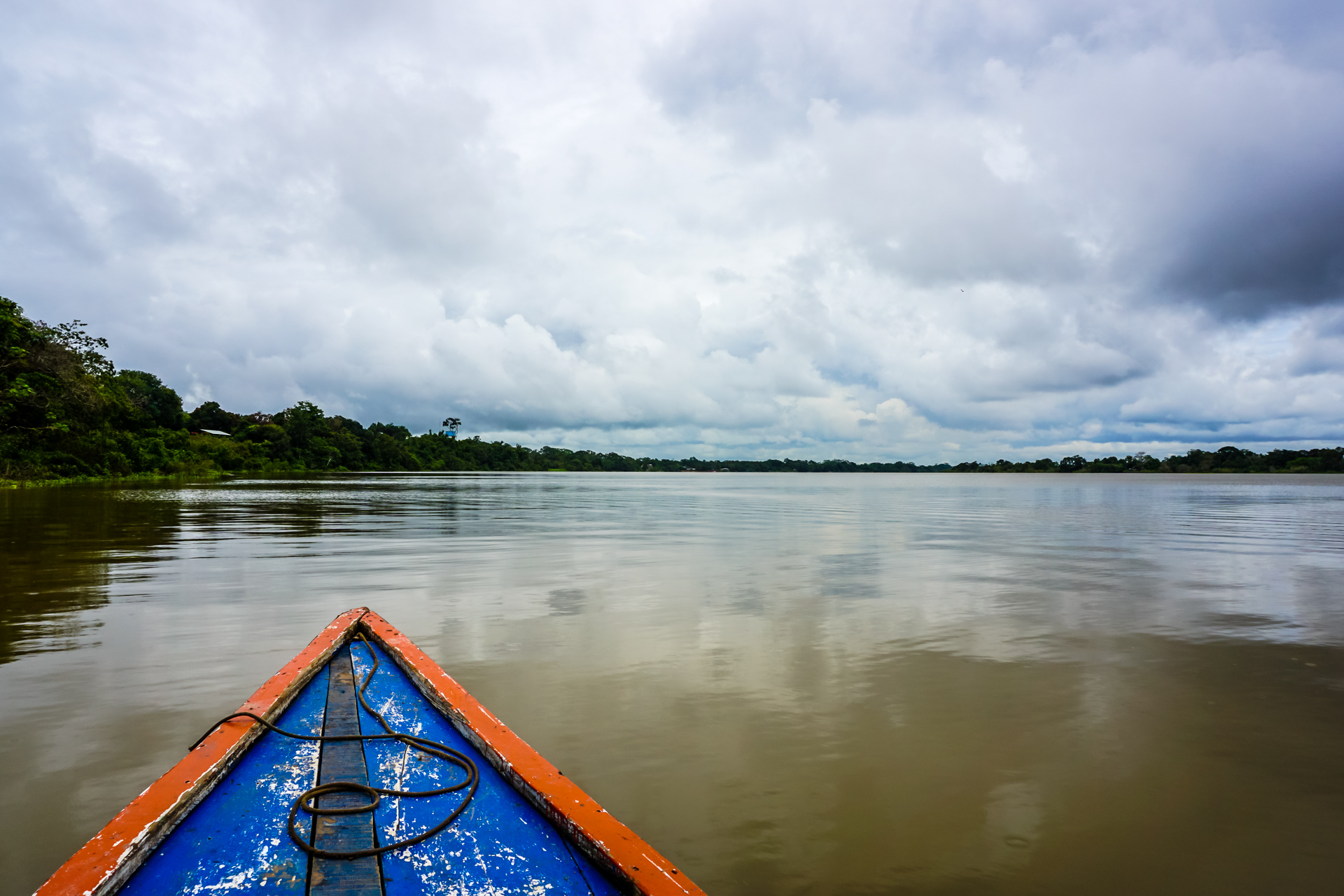 Laguna de Yarinacocha, Pucallpa, Ucayali, Perú.